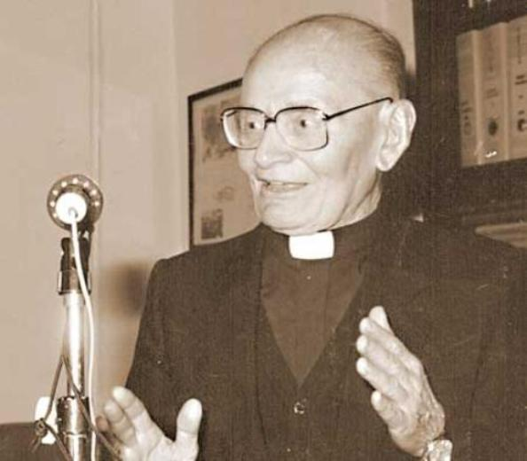 Reproducción fotográfica de Jorge Kemerer en 1981